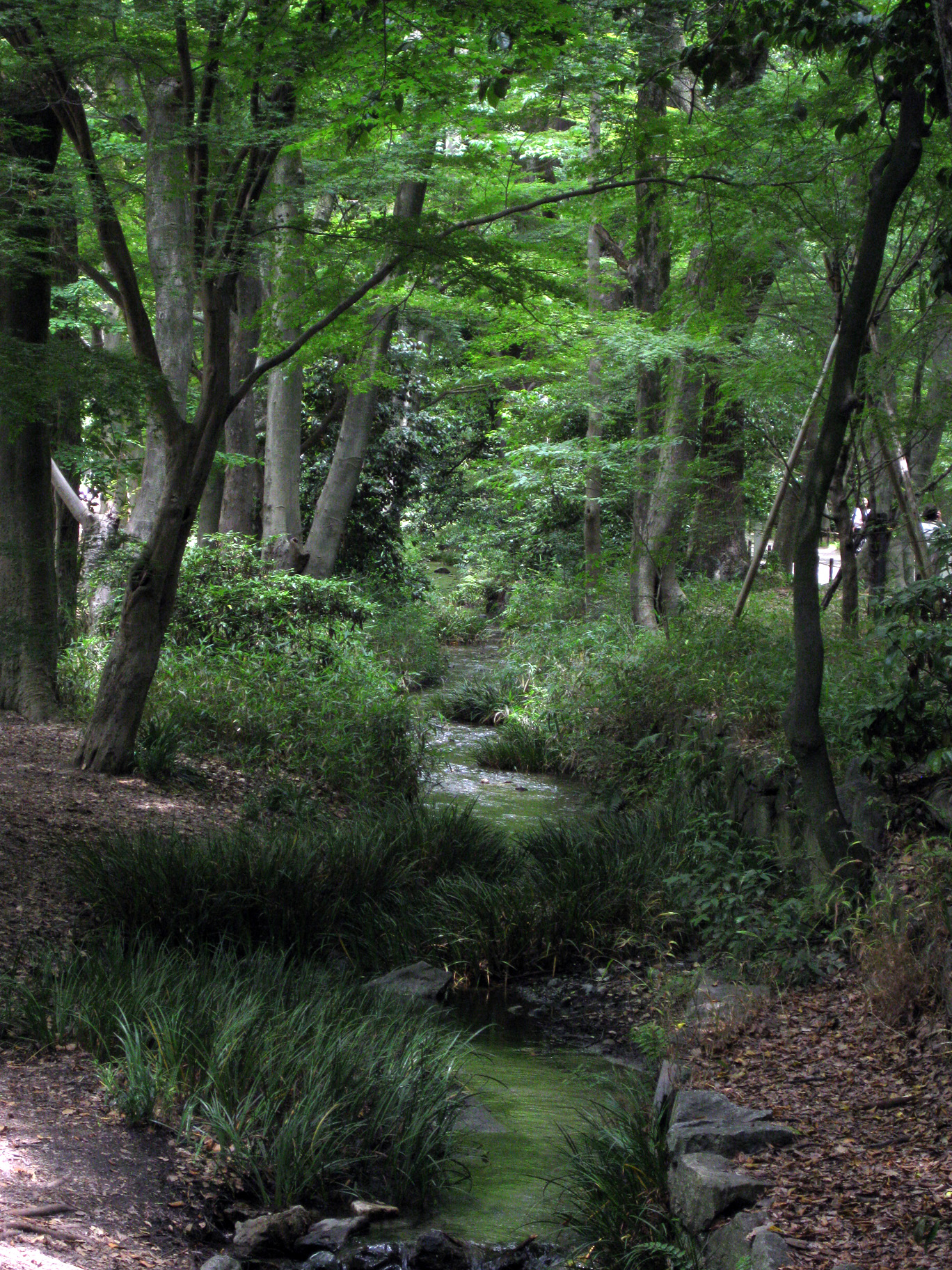 Tadasu_no_mori ("糺の森") in Shimogamo Jinja ("賀茂御祖神社（下鴨神社）"), Kyoto Pref. Japan.